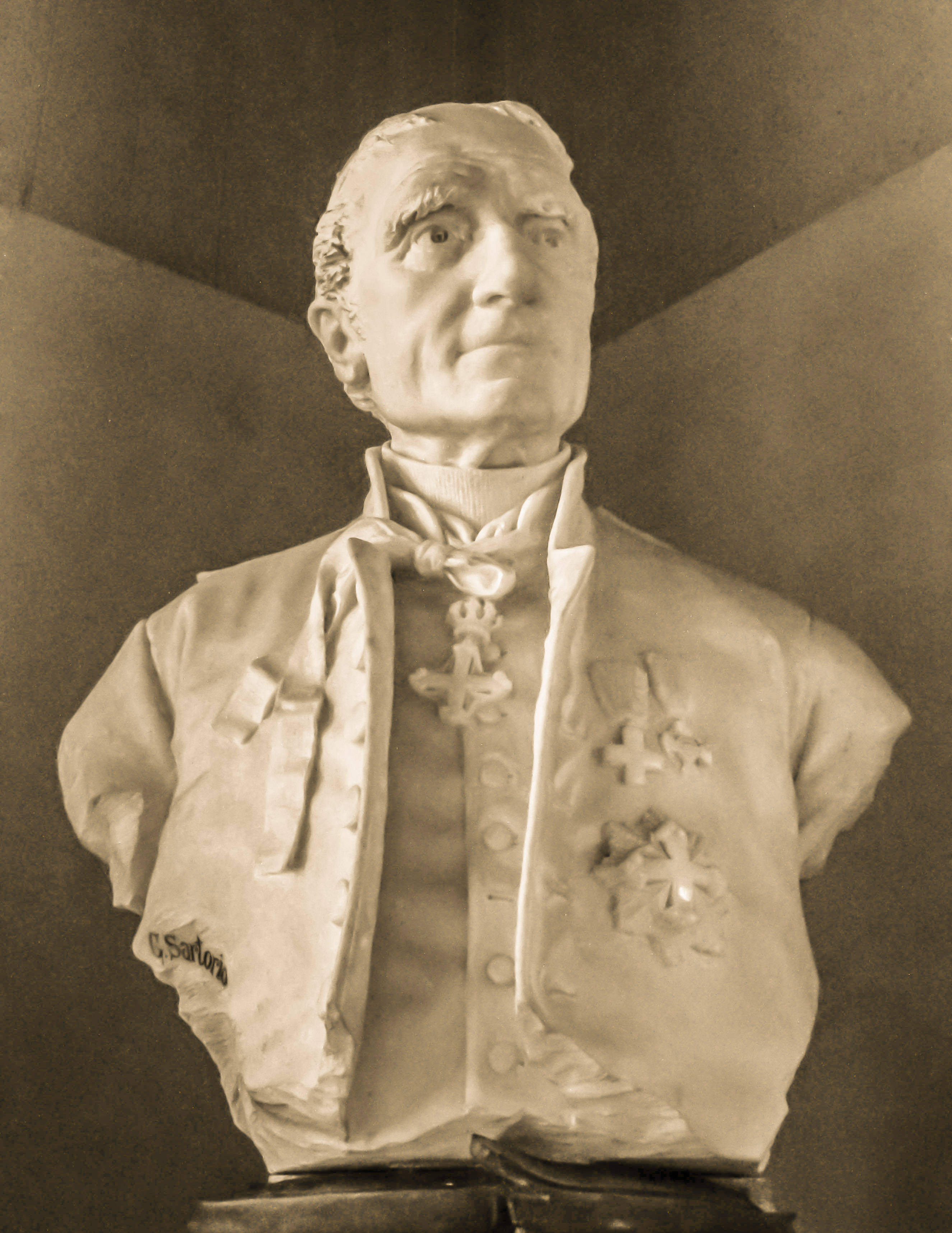 Busto di Giovanni Spano nel Museo Archeologico Nazionale di Cagliari. This is a photo of a monument which is part of cultural heritage of Italy.